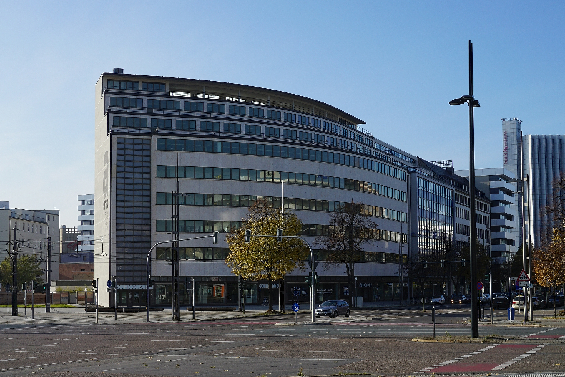 Ehemaliges Kaufhaus Schocken, smac, Chemnitz Brückenstraße, 2015